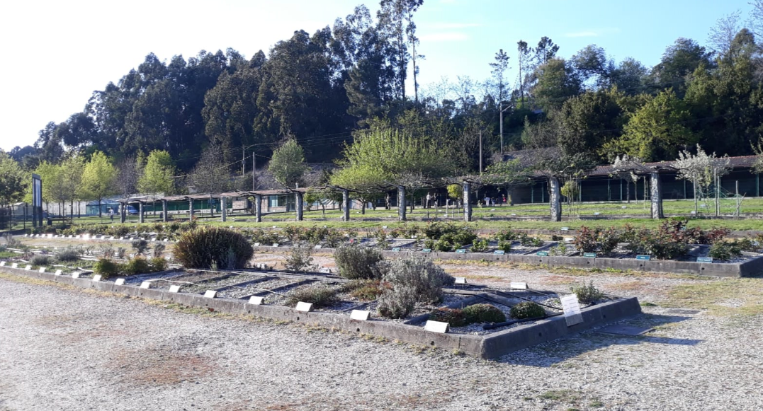 Xardín botánico